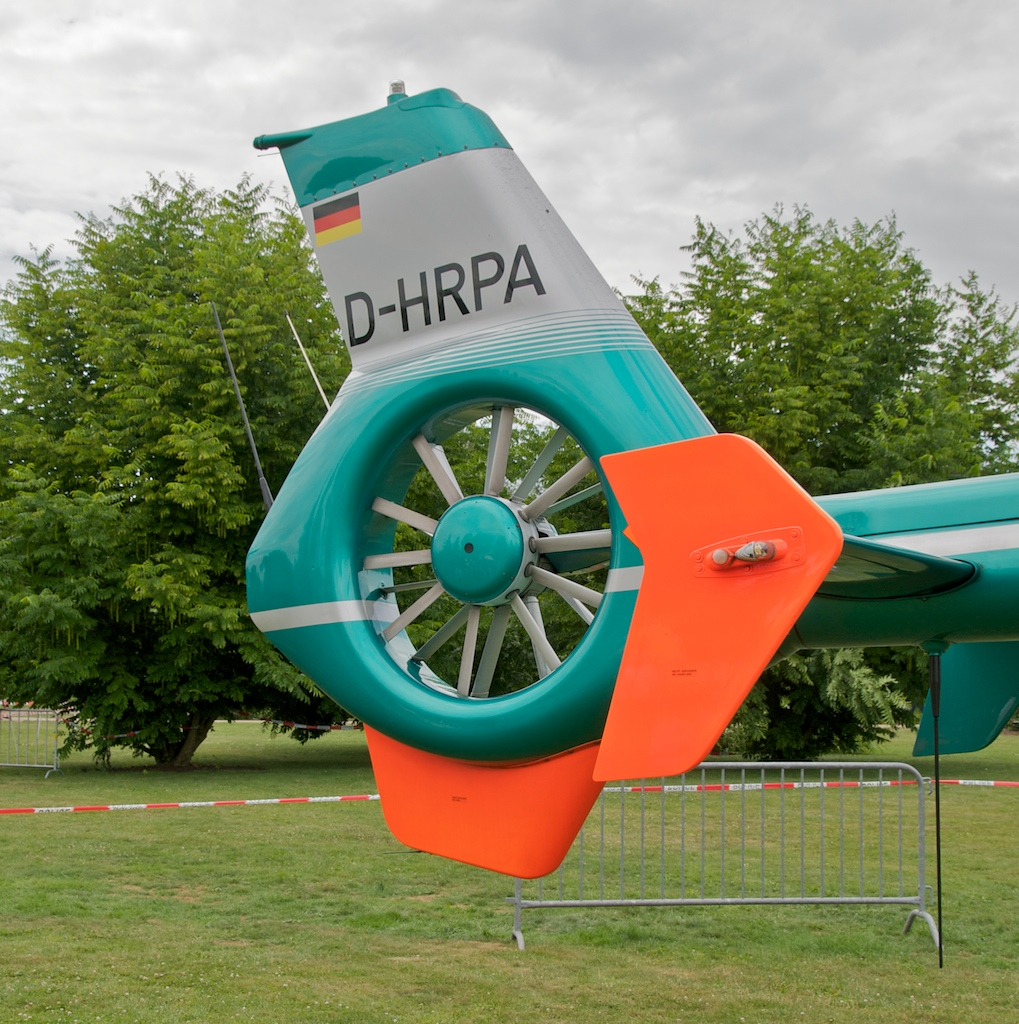 Fenestron op engem EC 135. Kategorie:Helikopteren